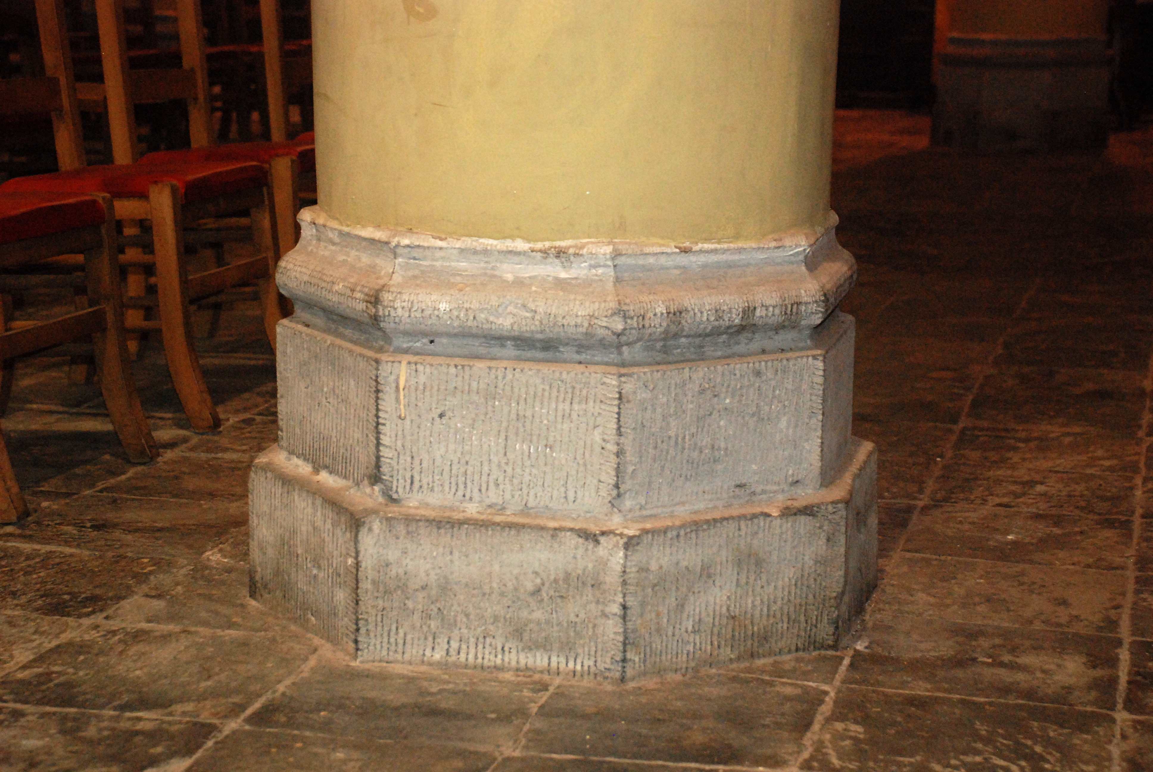 Belgique - Brabant wallon - Église Saint-Martin de Ways